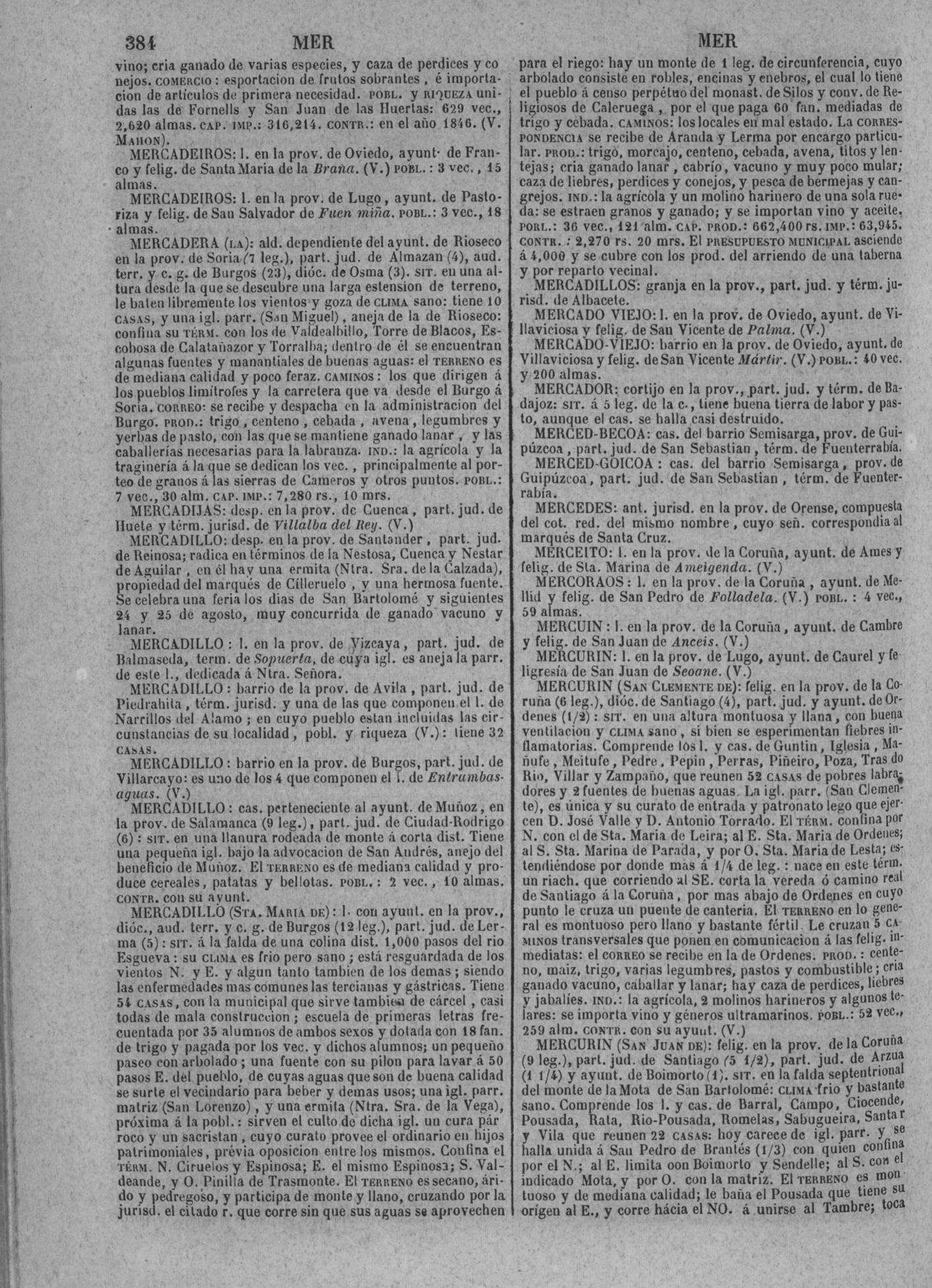 Decripción de todas las poblaciones de España y sus posesiones en 1846 elaborado por Pascual Madoz